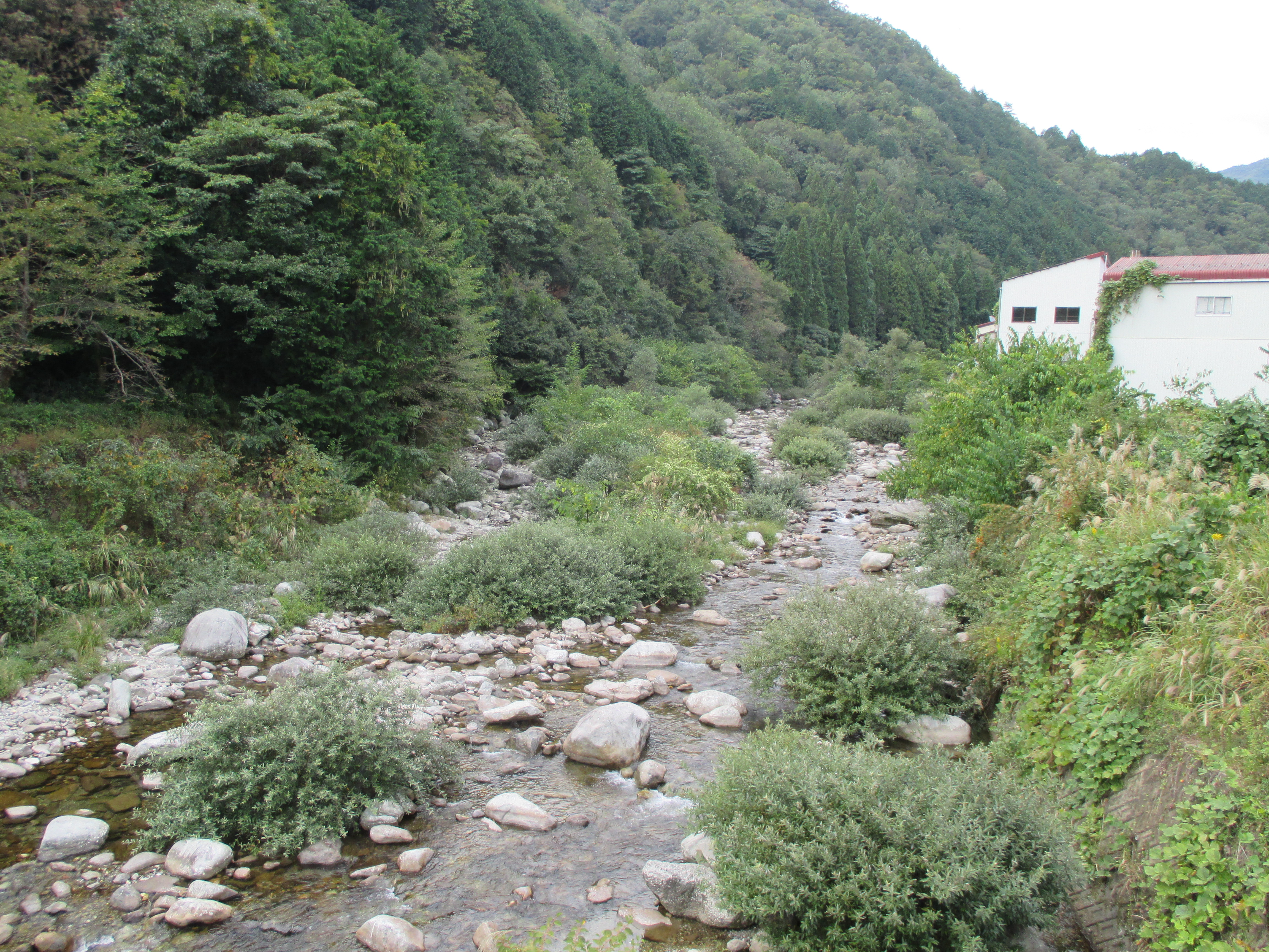 金門橋より上流側を撮影